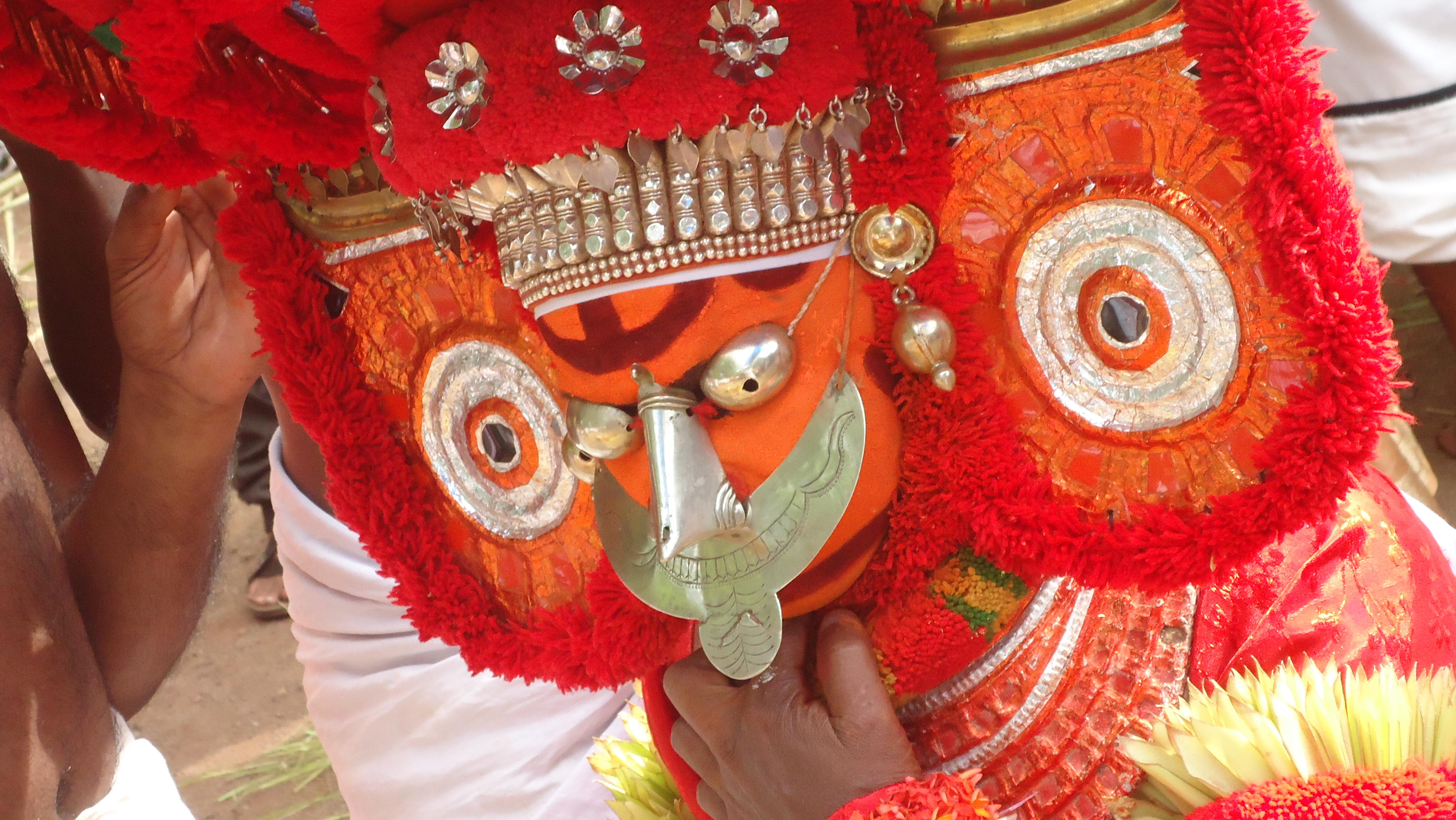 കുറഇ തെയ്യം നാടു വലം വച്ച് അരി ദക്ഷിണ മേടിച്ചു കൊണ്ട് വരുന്ന ഒരു ആചാരം ഉണ്ട് .വണ്ണാന്‍ സമുദായത്തില്‍ പെട്ടവര്‍ ആണ് ഇ തെയ്യം കെട്ടുന്നത്